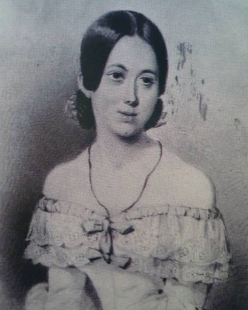 Louisa Piepenhagen - (1825-1893)